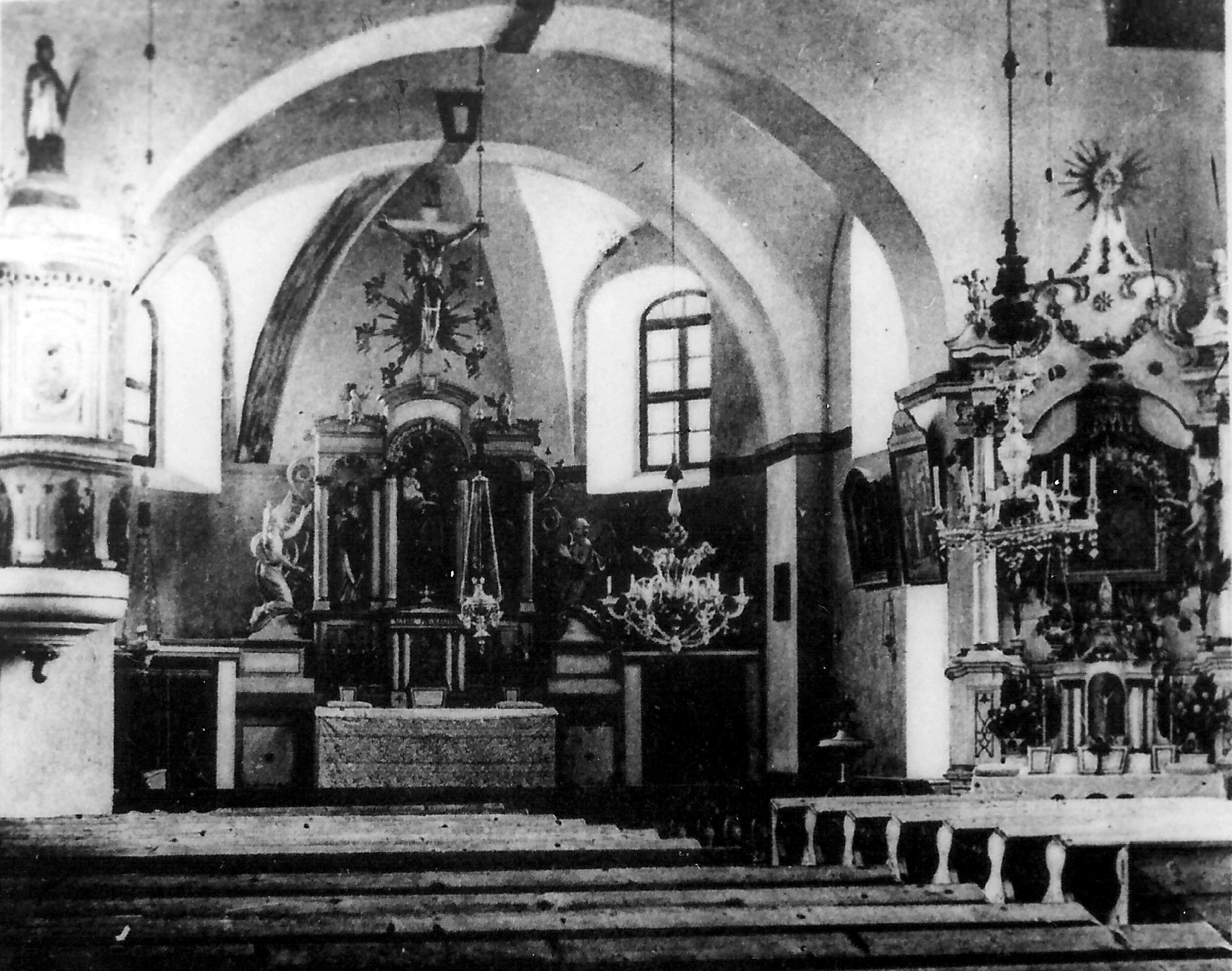 Pfarrkirche St. Antonius von Padua in Hirschenstand Innenansicht